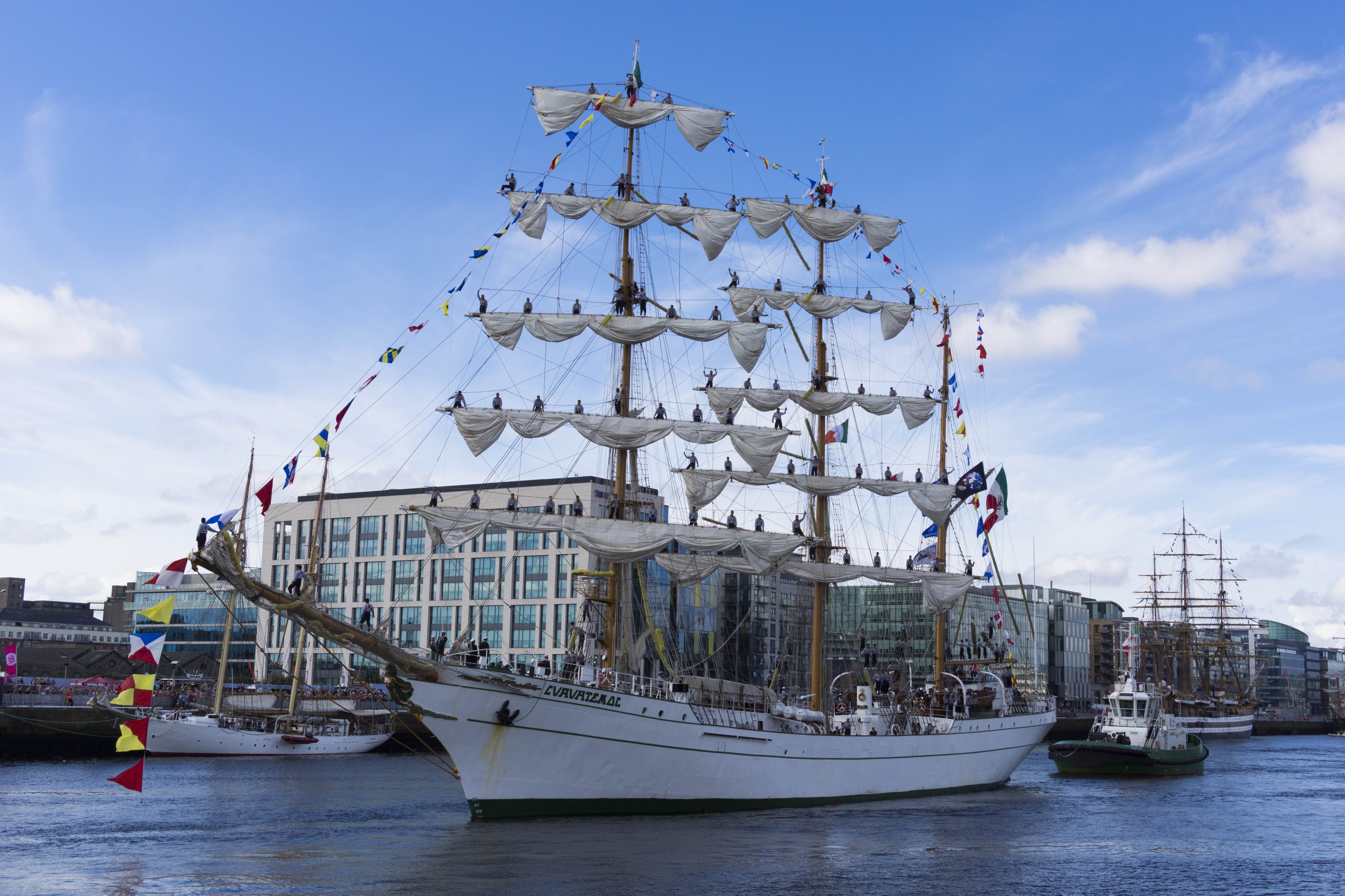 Cuauhtémoc